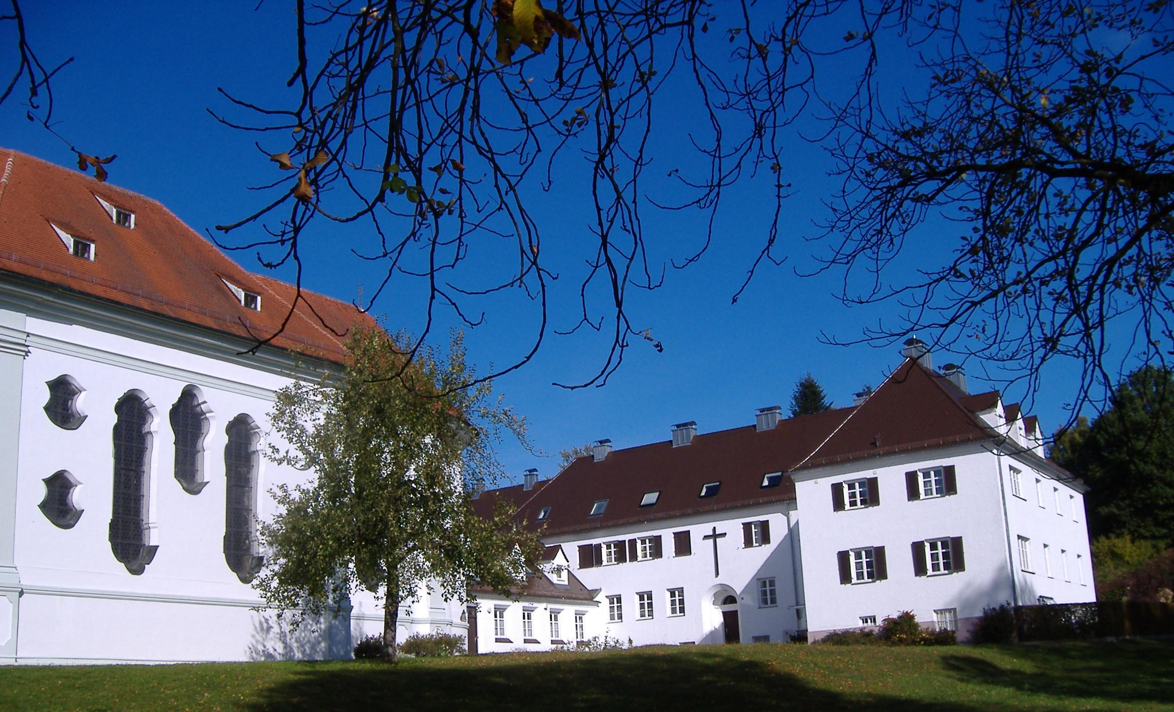 Welden